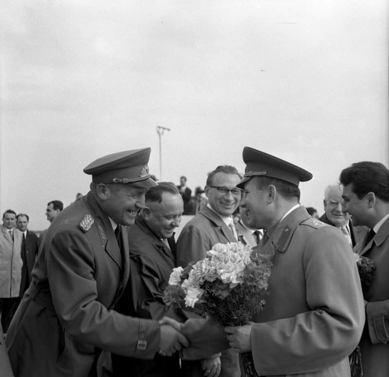 Berlin, Minister Hoffmann begrüßt Gagarin Zentralbild - 6.5.1965 - 20. Jahrestag der Befreiung Zur Teilnahme an den Feierlichkeiten anläßlich des 20. Jahrestages der Befreiung des deutschen Volkes vom Faschismus trafen am 6.5.1965 auch die Delegationen aus der Sowjetunion, der Volksrepublik Polen und der Mongolischen Volksrepublik auf dem Zentralflughafen Berlin-Schönefeld ein. UBz.: Herzliche Begrüßung zwischen Juri Gagarin, dem ersten Kosmonauten der Sowjetunion (rechts) und dem Minister für Nationale Verteidigung der DDR, Armeegeneral Heinz Hoffmann, 2.v.r. Heinz Mielke, Minister für Staatssicherheit und 3.v.r. Kurt Thieme, Ständiger Stellvertreter des Oberbürgermeisters von Groß-Berlin. Abgebildete Personen: Mielke, Erich: Minister für Staatssicherheit, Armeegeneral, Politbüro des Zentralkomitees (ZK) der SED, DDR (PND 118977490) Hoffmann, Heinz: Minister für Nationale Verteidigung, Mitglied des ZK der SED, DDR Gagarin, Juri Alexandrowitsch: Kosmonaut, Sowjetunion